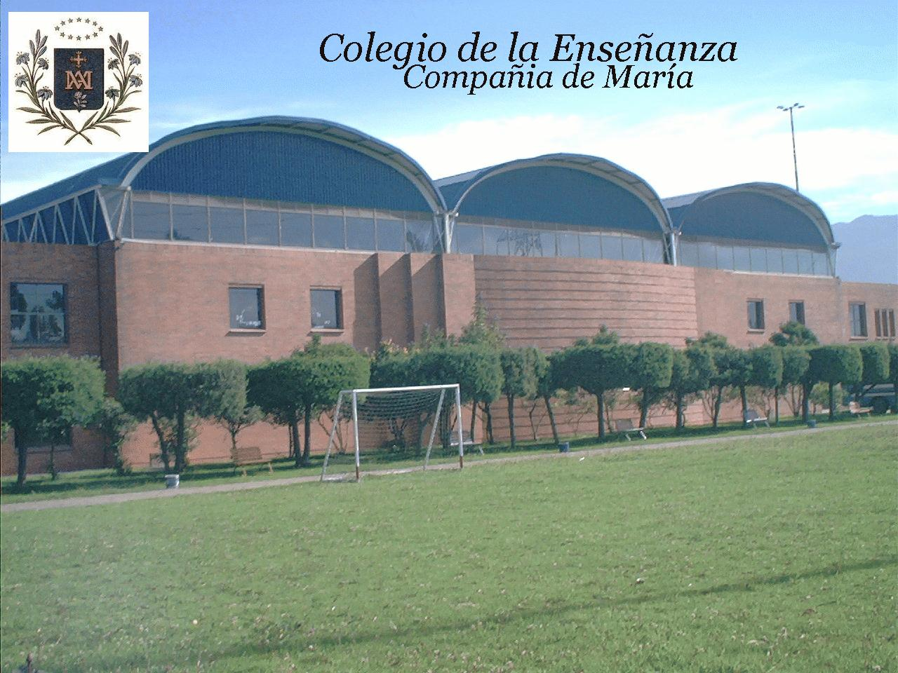 Colegio de la enseñanza Bogota, Colombia